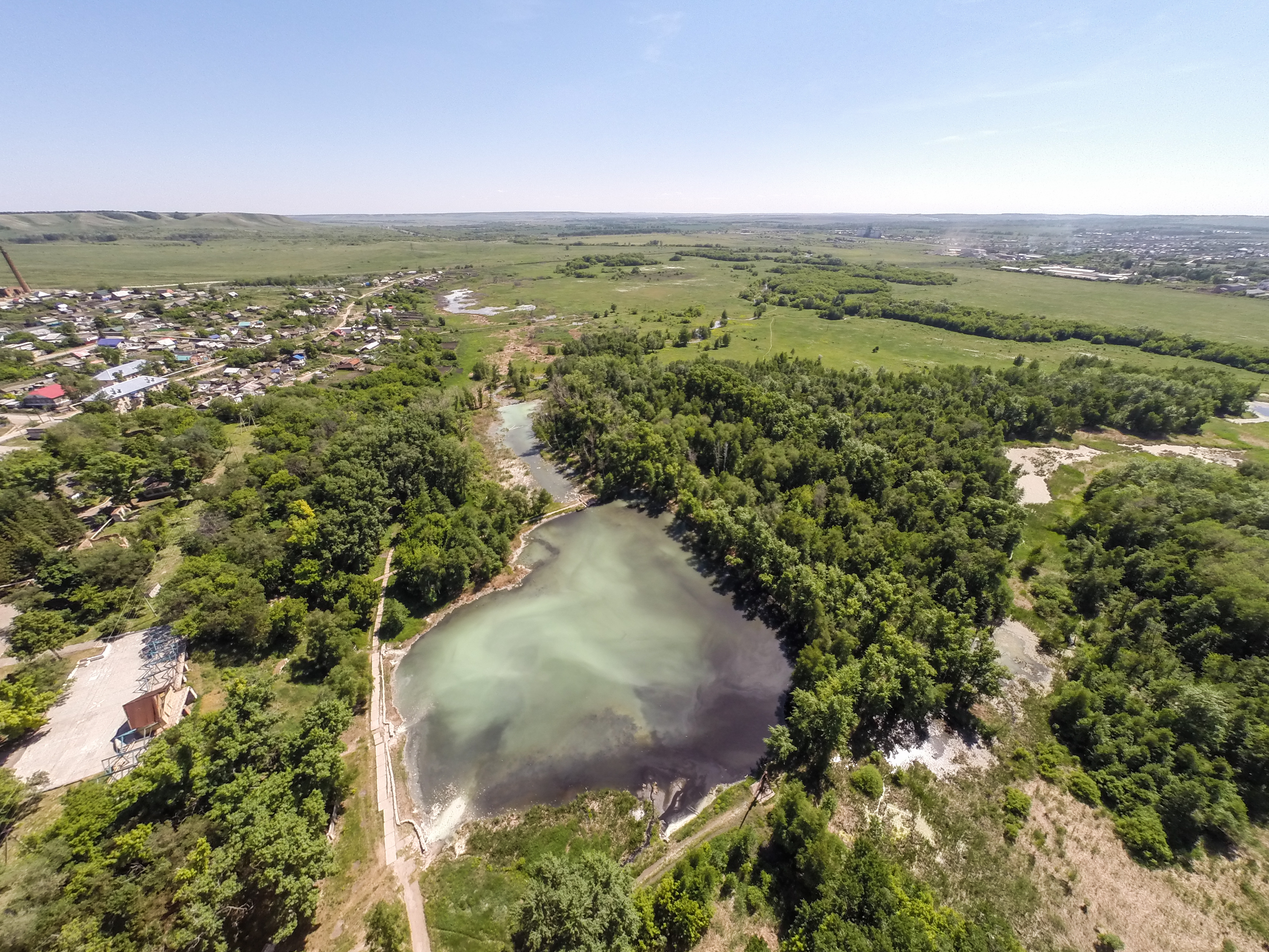 Серное озеро, Сергиевский район This image is related to the protected area of Russia number 6338015